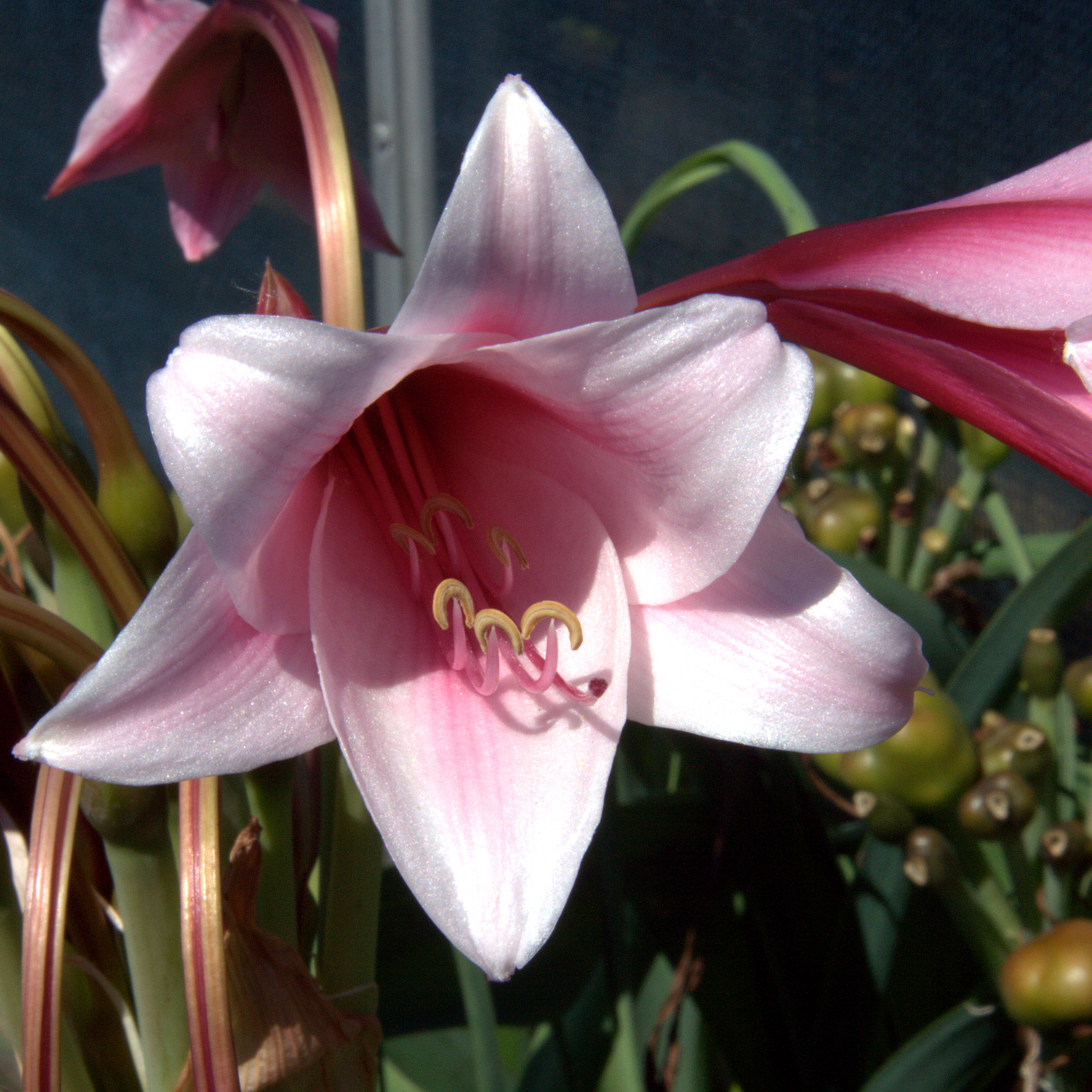 Crinum bulbispermum (strimkrinum)